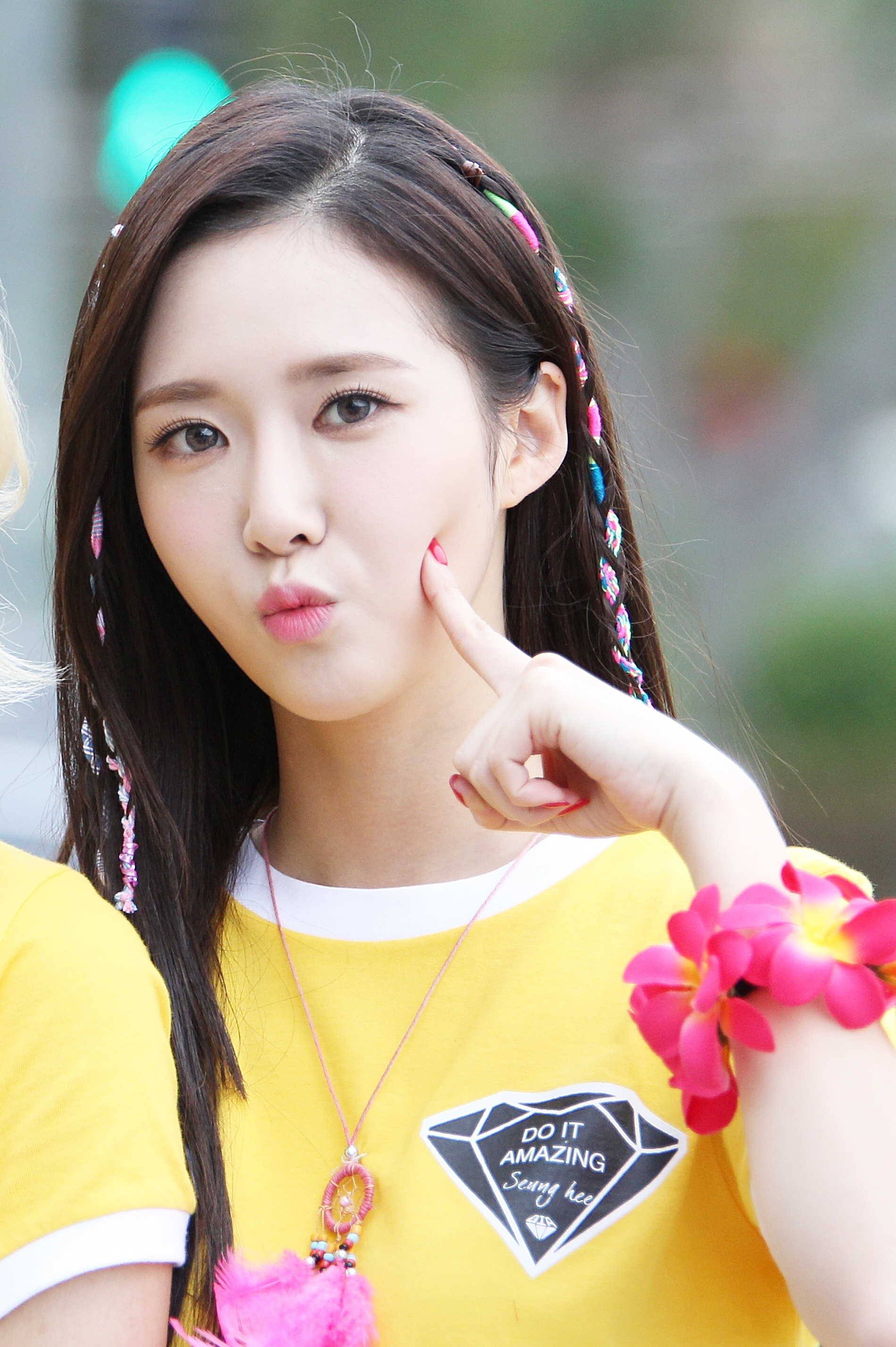 150929 다이아 - SBS 더쇼 팬미팅 DIA - SBS the show fanmeeting (13P)